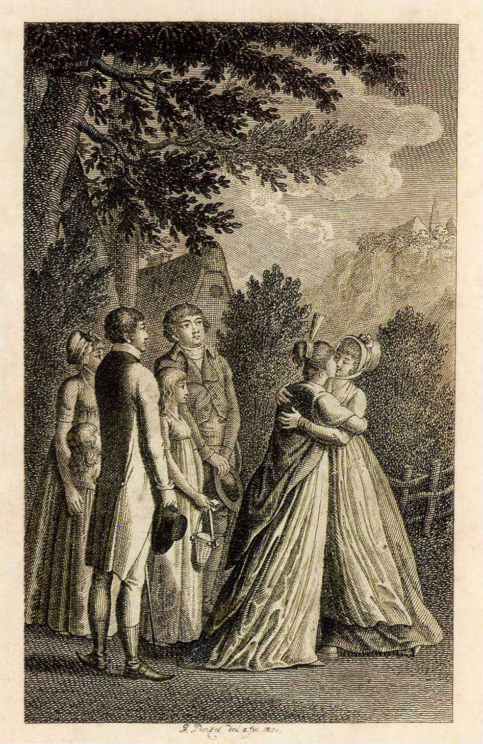 Johann Georg Penzel: Frontispiz zu Sophie von La Roche: Fanny und Julia oder Die Freundinnen.